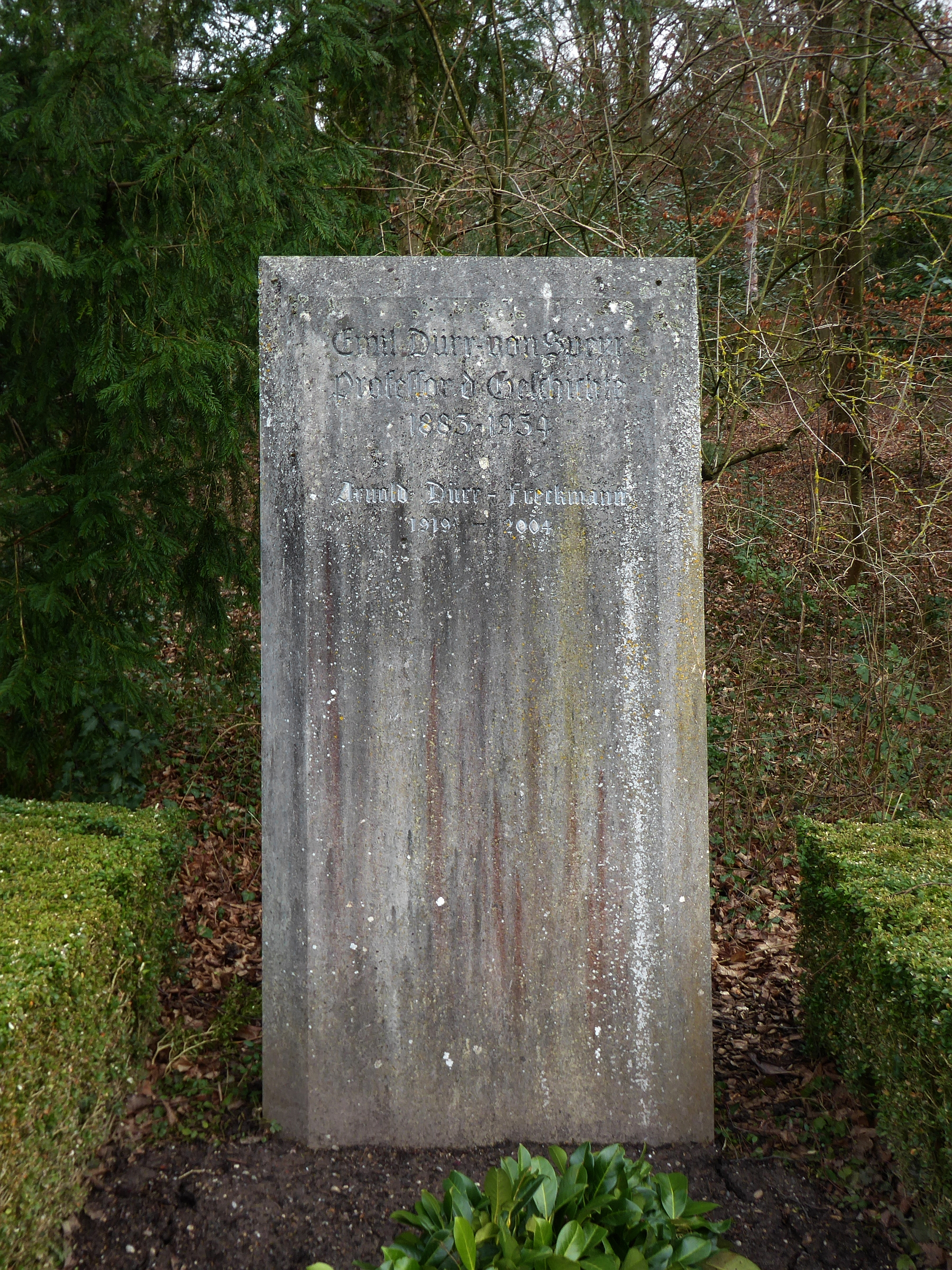 Emil Dürr-von Speyr (1883–1954), Professor der Geschichte, Historiker, Prof. an der Univ. Basel., Grab auf dem Friedhof Hörnli, Riehen, Basel-Stadt